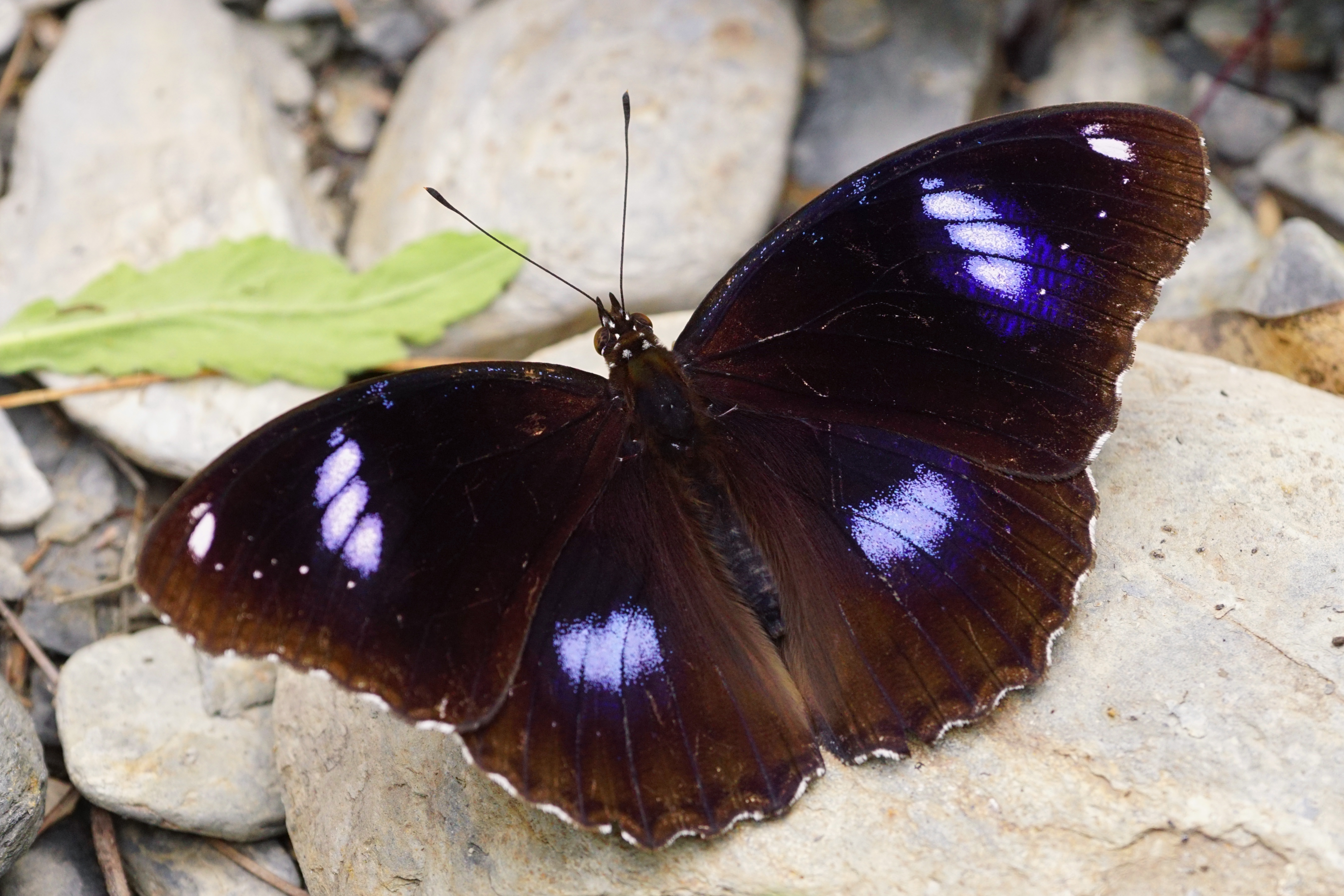 幻蛺蝶 Hypolimnas bolina kezia